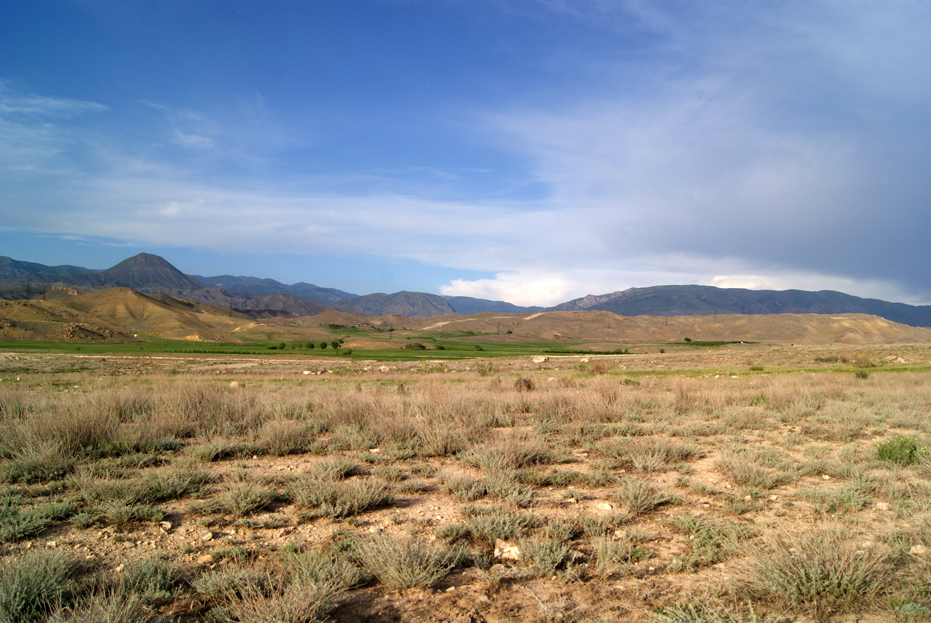 Գոռավանի ավազուտներ պետական արգելավայր